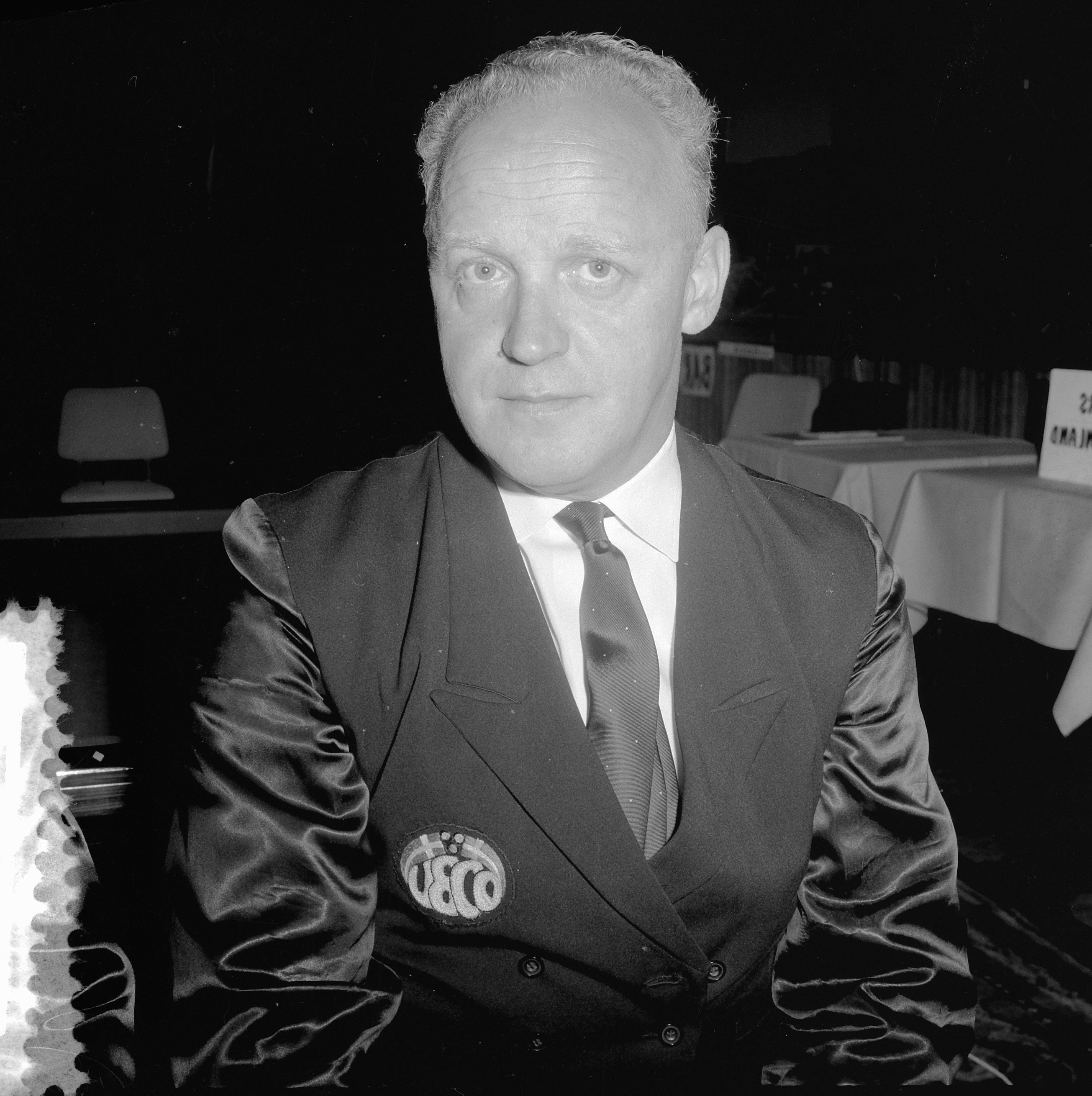 Collectie / Archief : Fotocollectie Anefo Reportage / Serie : [ onbekend ] Beschrijving : Kampioenschappen biljaren in Ostende, koppen Saren Sogaard (Denemarken) Datum : 4 augustus 1964 Locatie : Denemarken, Oostende Trefwoorden : KAMPIOENSCHAPPEN, biljarten Fotograaf : Koch, Eric / Anefo Auteursrechthebbende : Nationaal Archief Materiaalsoort : Negatief (zwart/wit) Nummer archiefinventaris : bekijk toegang 2.24.01.03 Bestanddeelnummer : 916-7233